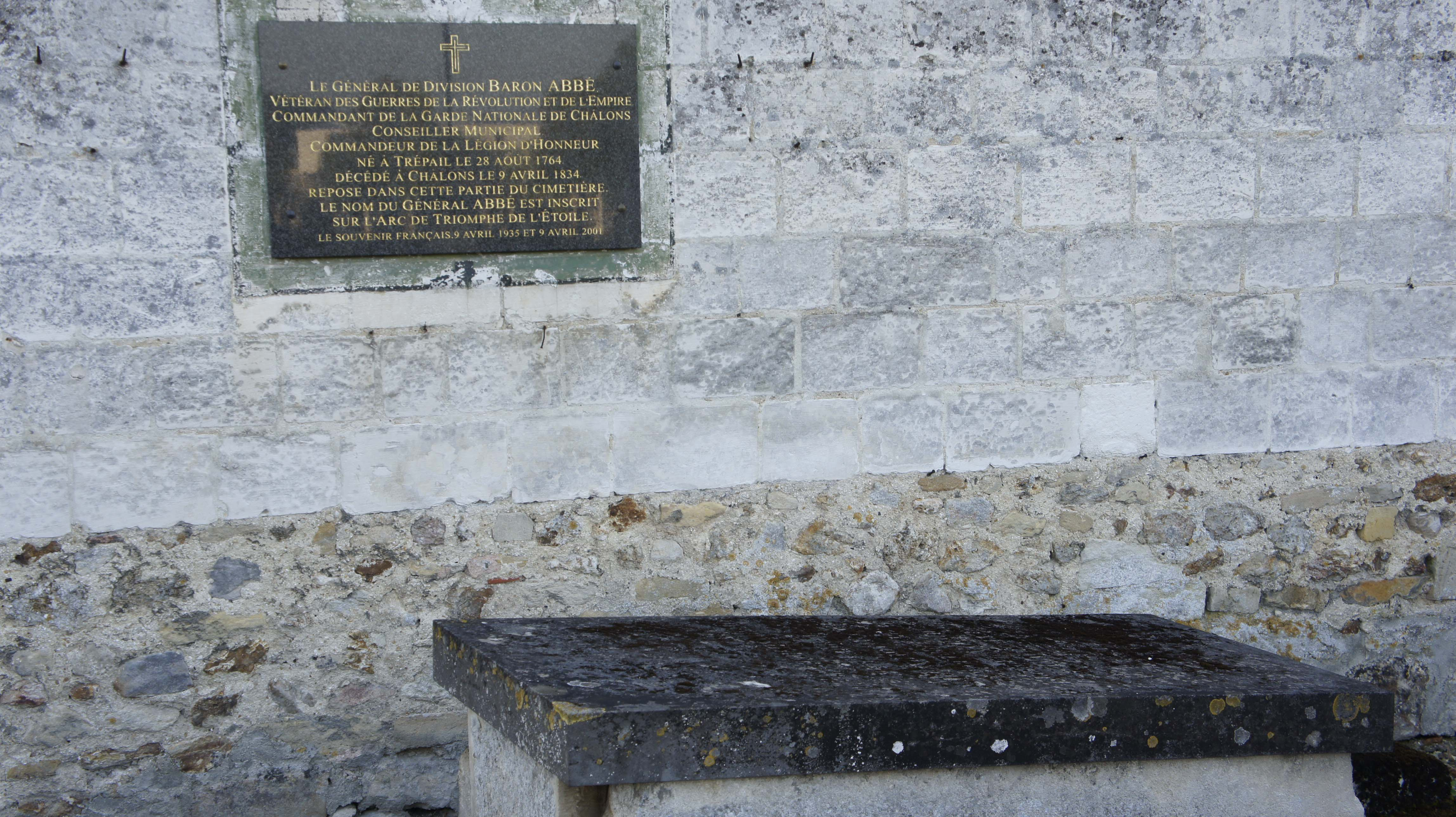 Vue de la tombe de Baron Abbé, la plaque est neuve car sa tombe se trouvait de l'autre côté du mur, elle fut déplacée au XXe siècle quand le tramway développa son emprise sur une partie du cimetière.